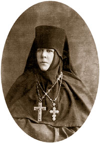 Фото игумении Таисии